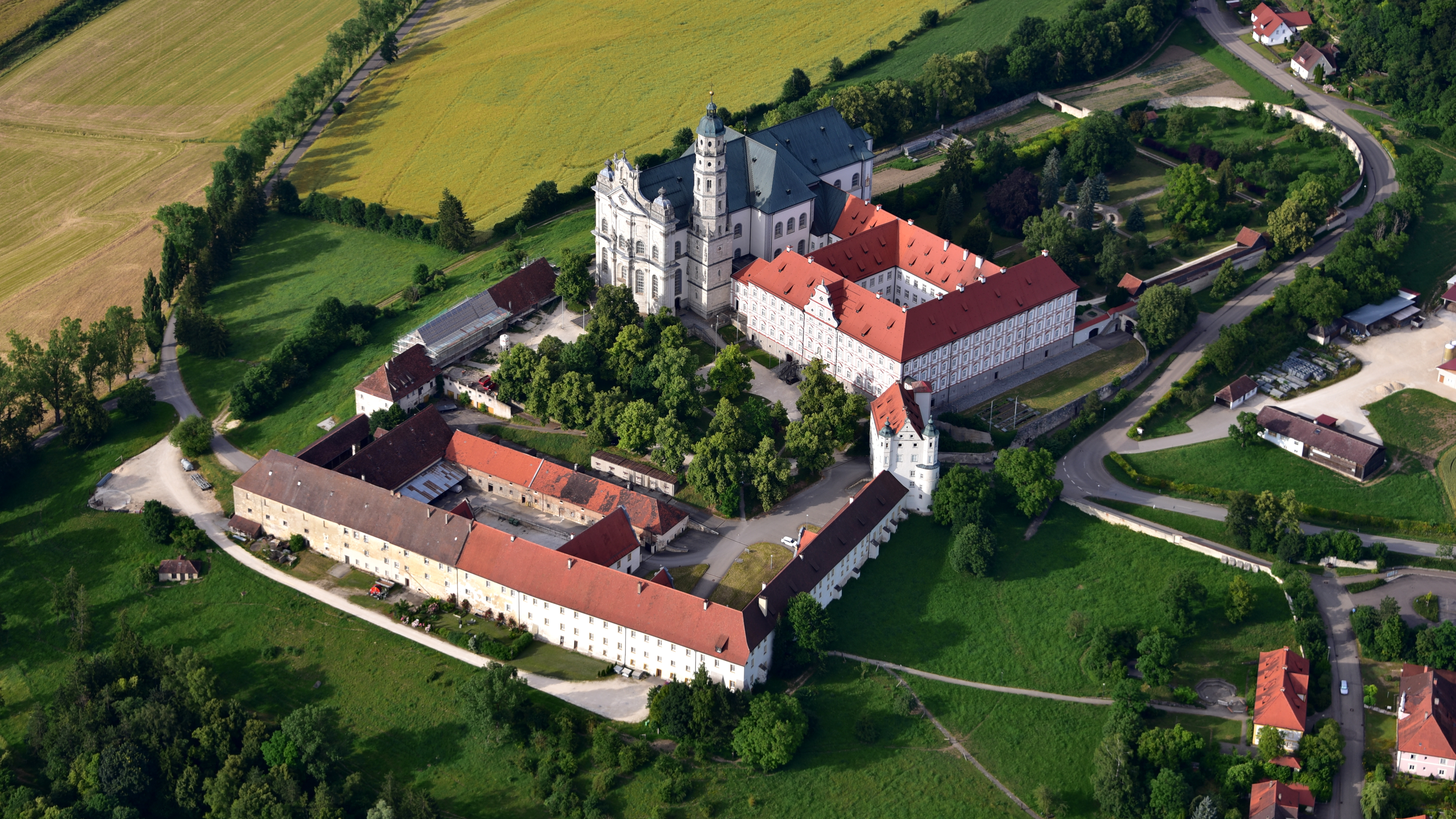 Abtei Neresheim, Luftaufnahme (2016)